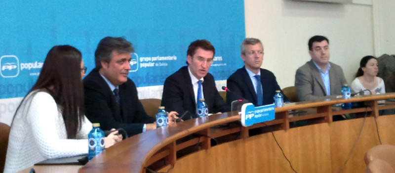 Feijóo, nun intre da súa comparecencia ante a prensa.